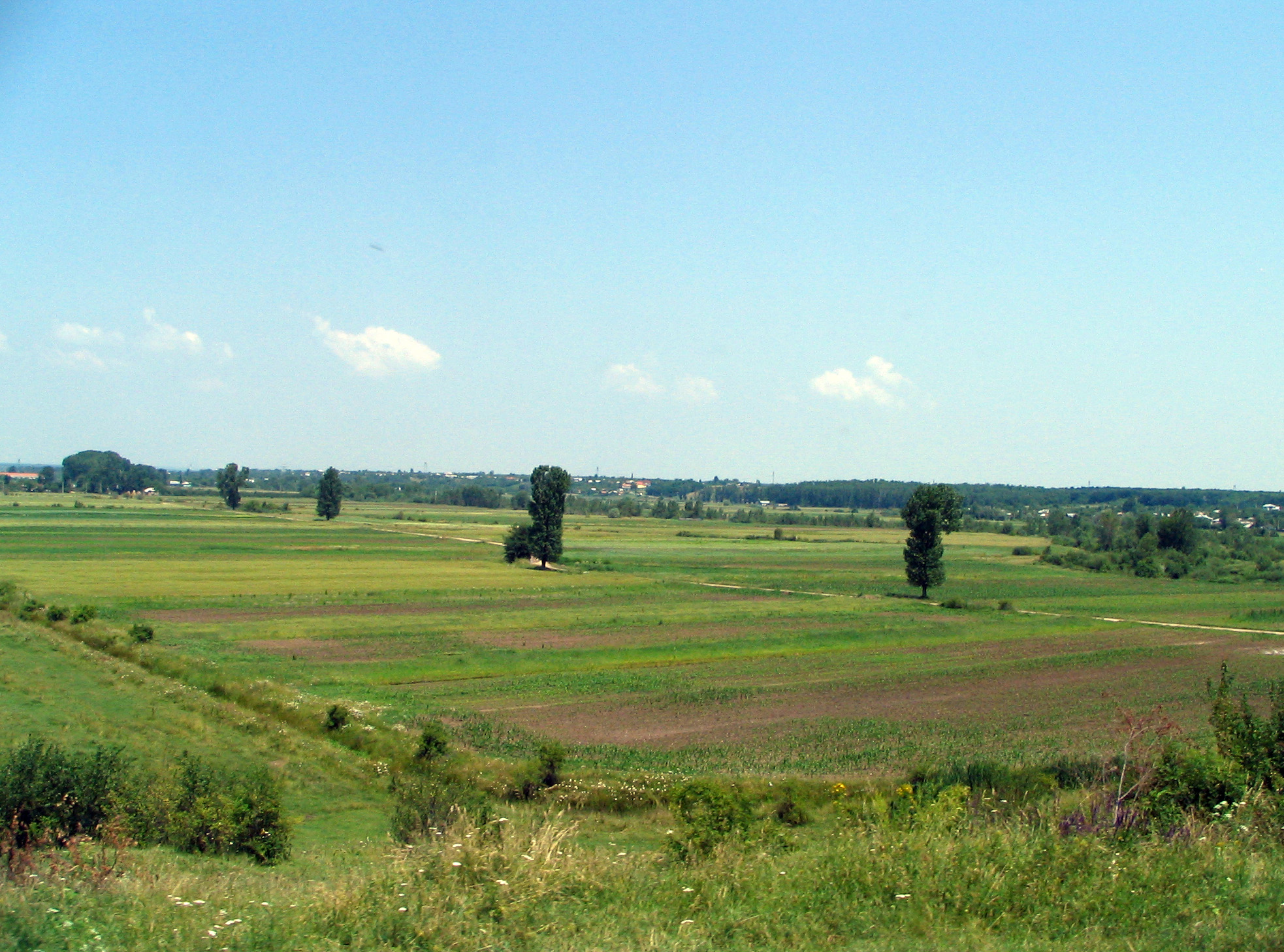 La Llanura Rumana, en la zona zur del distrito de Argeş taken by Bogdan Giuşcă, june 2006 in Argeş County, south of Costeşti